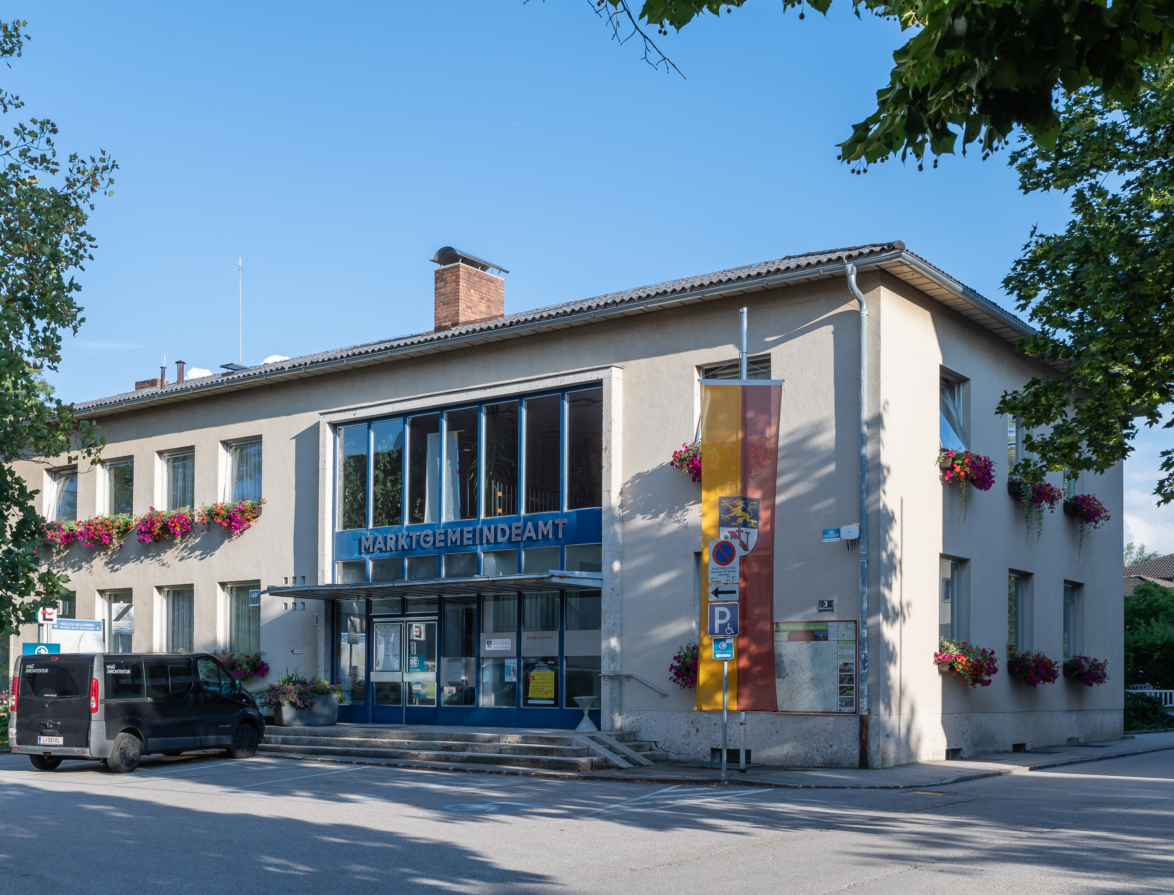 Das Gebäude des Marktgemeindeamtes von Neuhofen an der Krems wurde 1964 errichtet, mit der Heimatstube Neuhofen a. d. Krems.